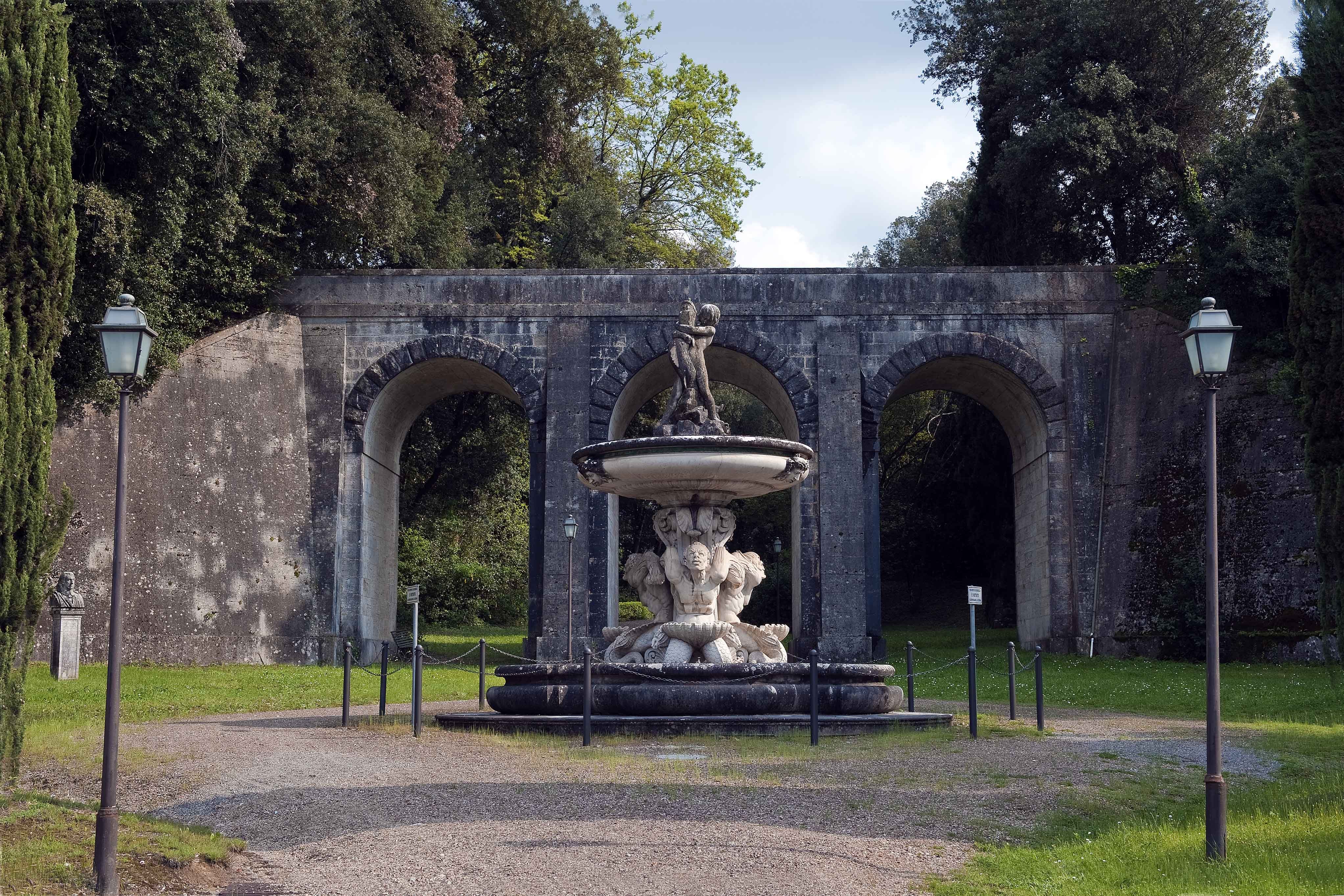 Villa Chigi Saracini, ingresso nord - Castelnuovo Berardenga - Siena